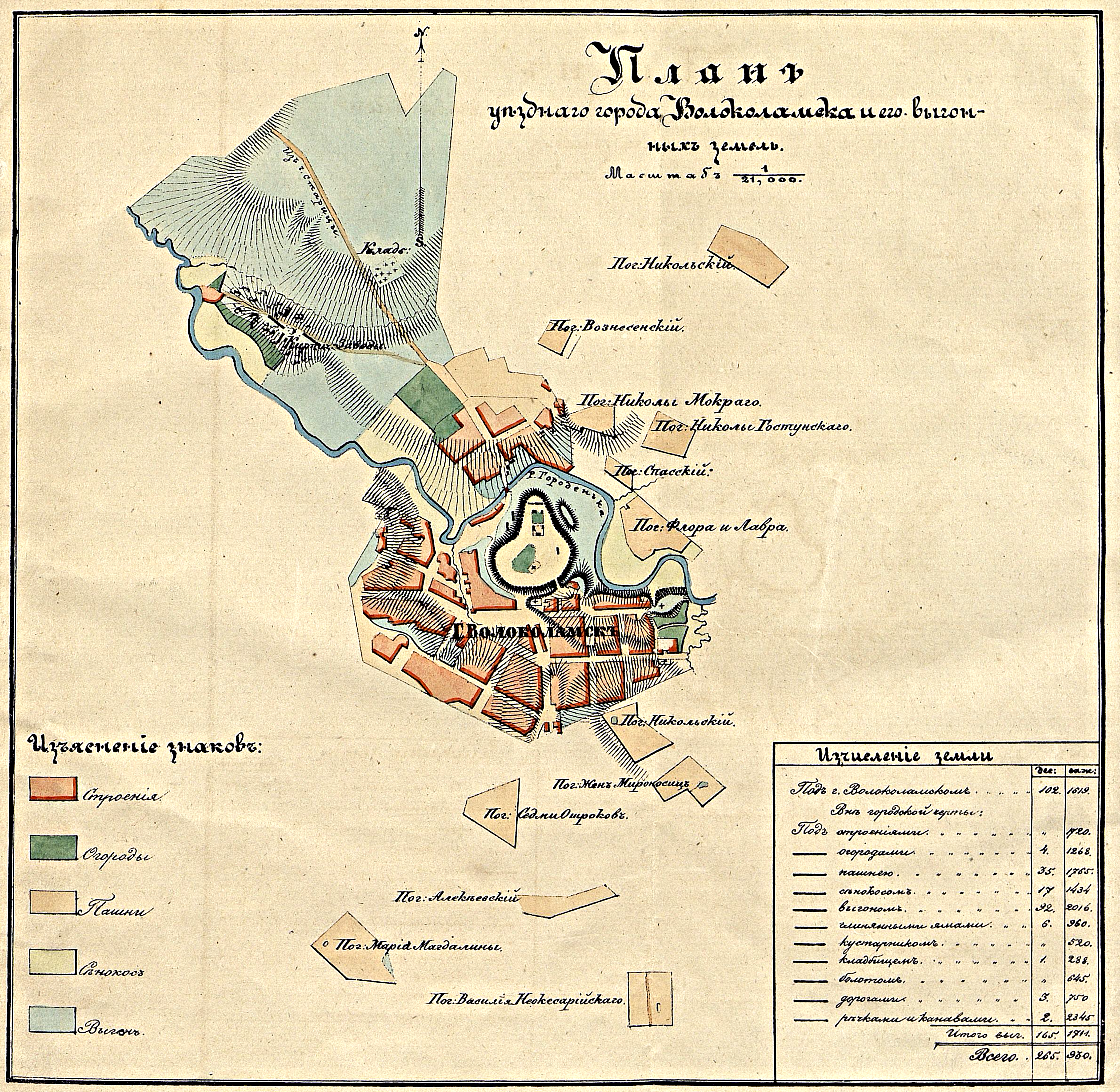 "План уездного города Волоколамска и его выгонных земель". Сборник материалов для изучения Москвы и Московской губернии. Выпуск I. - Москва, 1864